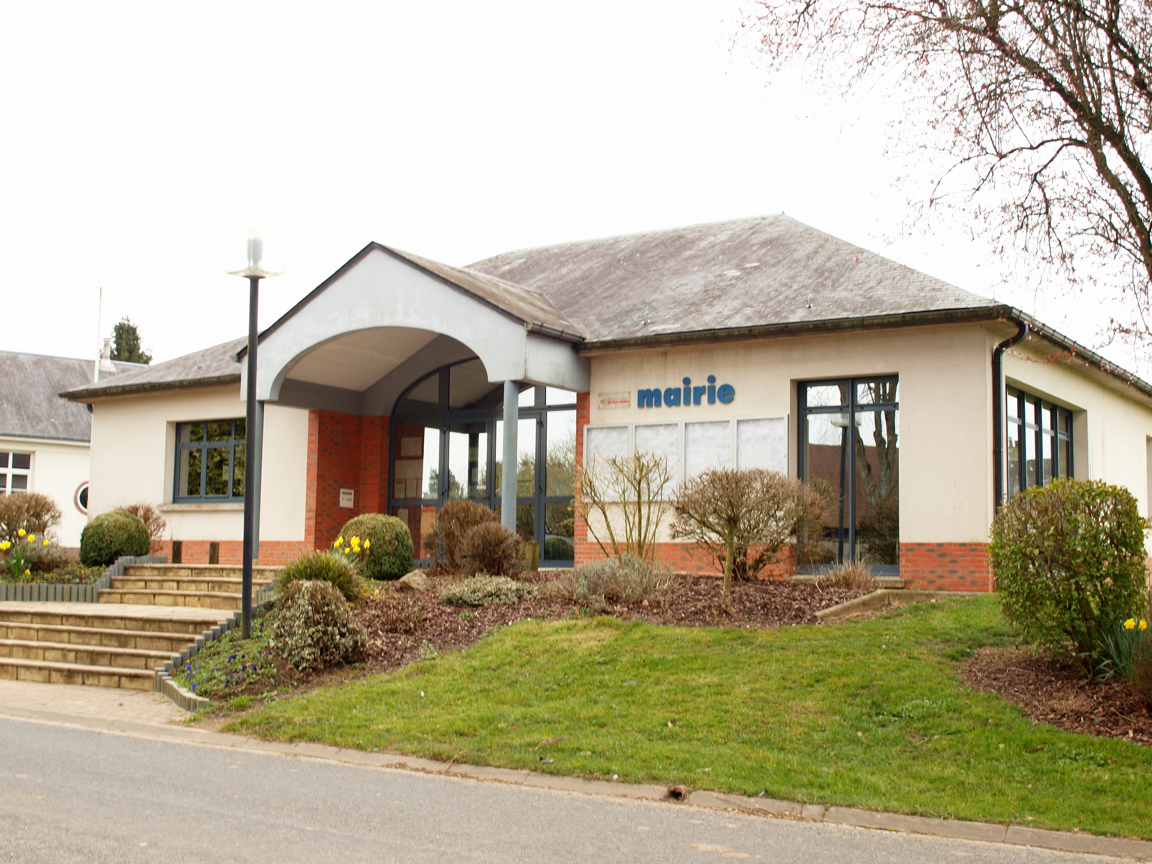 Gauville (Somme, France)